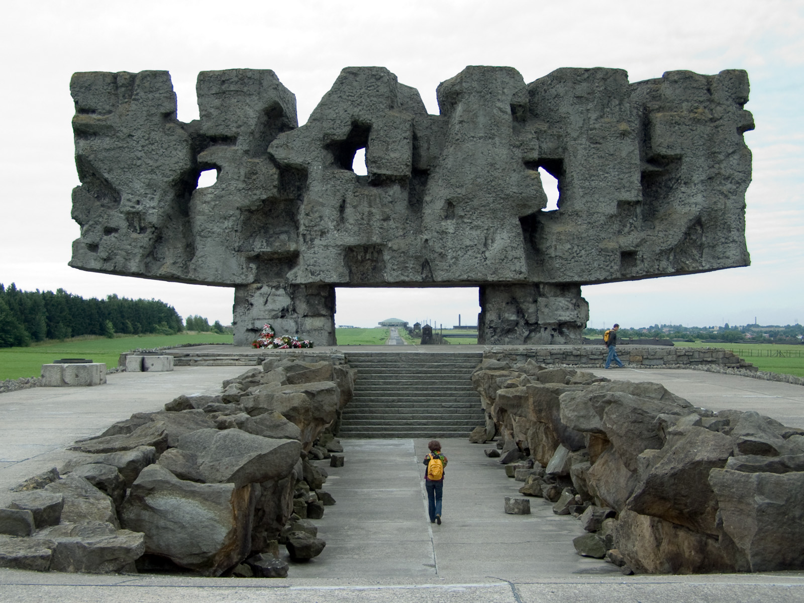 Obchody 64 rocznicy likwidacji niemieckiego obozu koncentracyjnego na Majdanku. Kwiaty i wieńce pod pomnikiem Męczenników Majdanka.